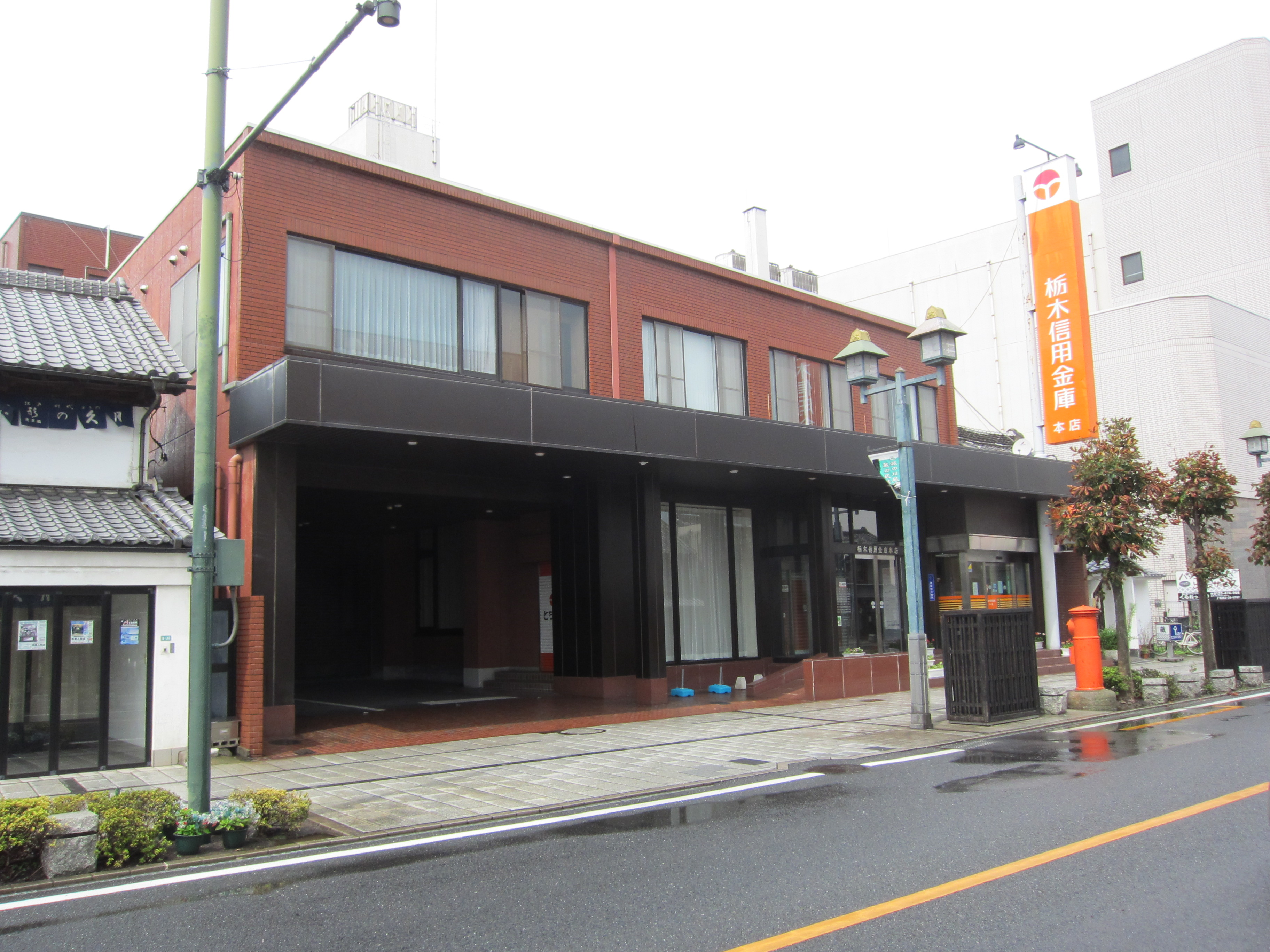 栃木信用金庫本店